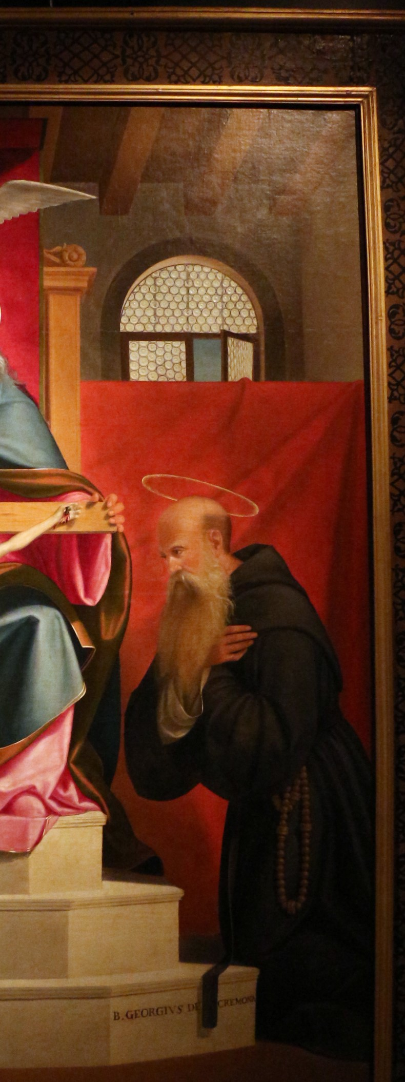 particolare di frate Giorgio da Cremona del dipinto di Andrea Previtali